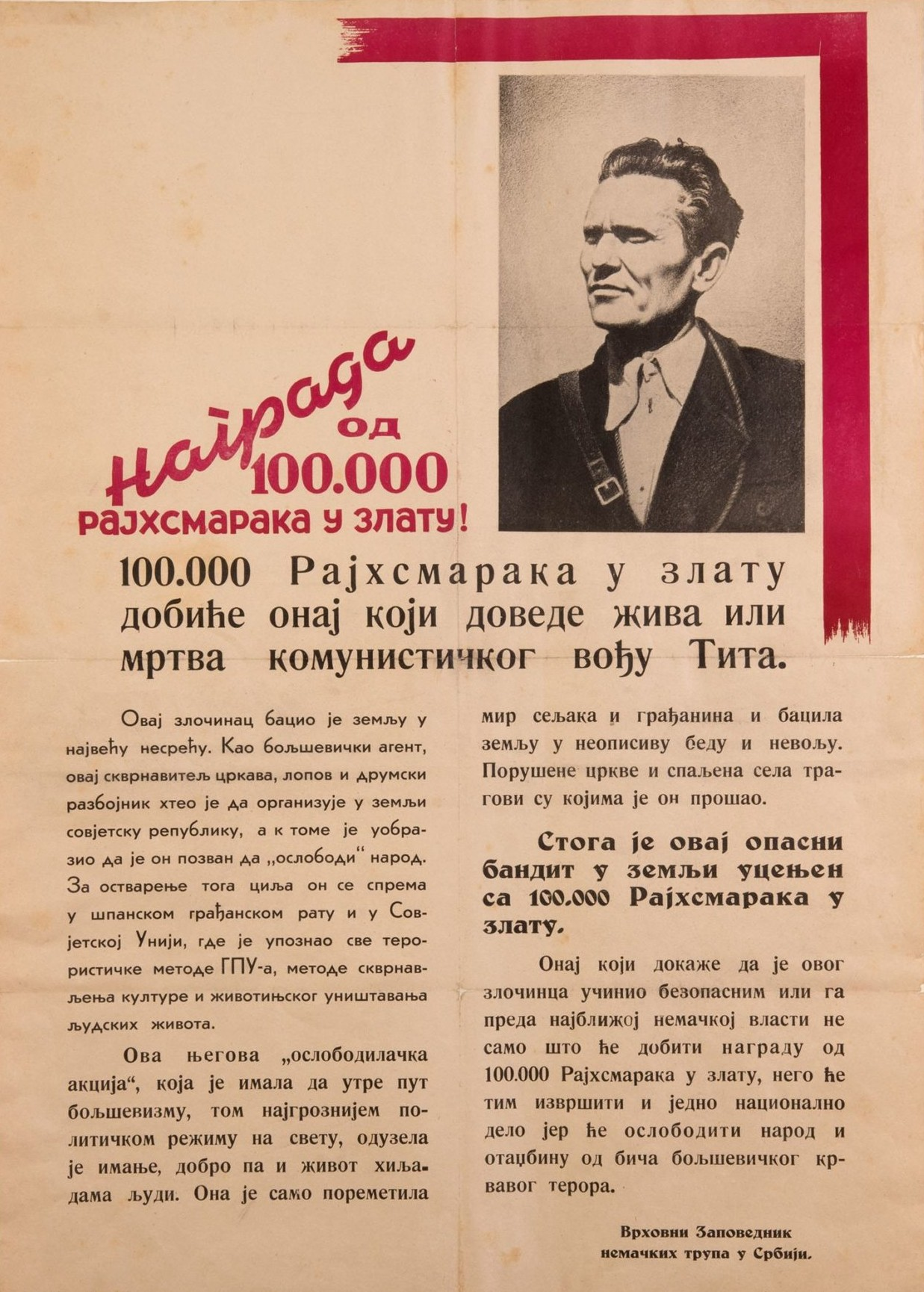 Немачка потерница за партизанским вођом Јосипом Брозом Титом, издата током операције Шварц маја-јуна 1943. године. Истовремено је издата и потерница за четничким вођом Дражом Михаиловићем, са истим текстом.